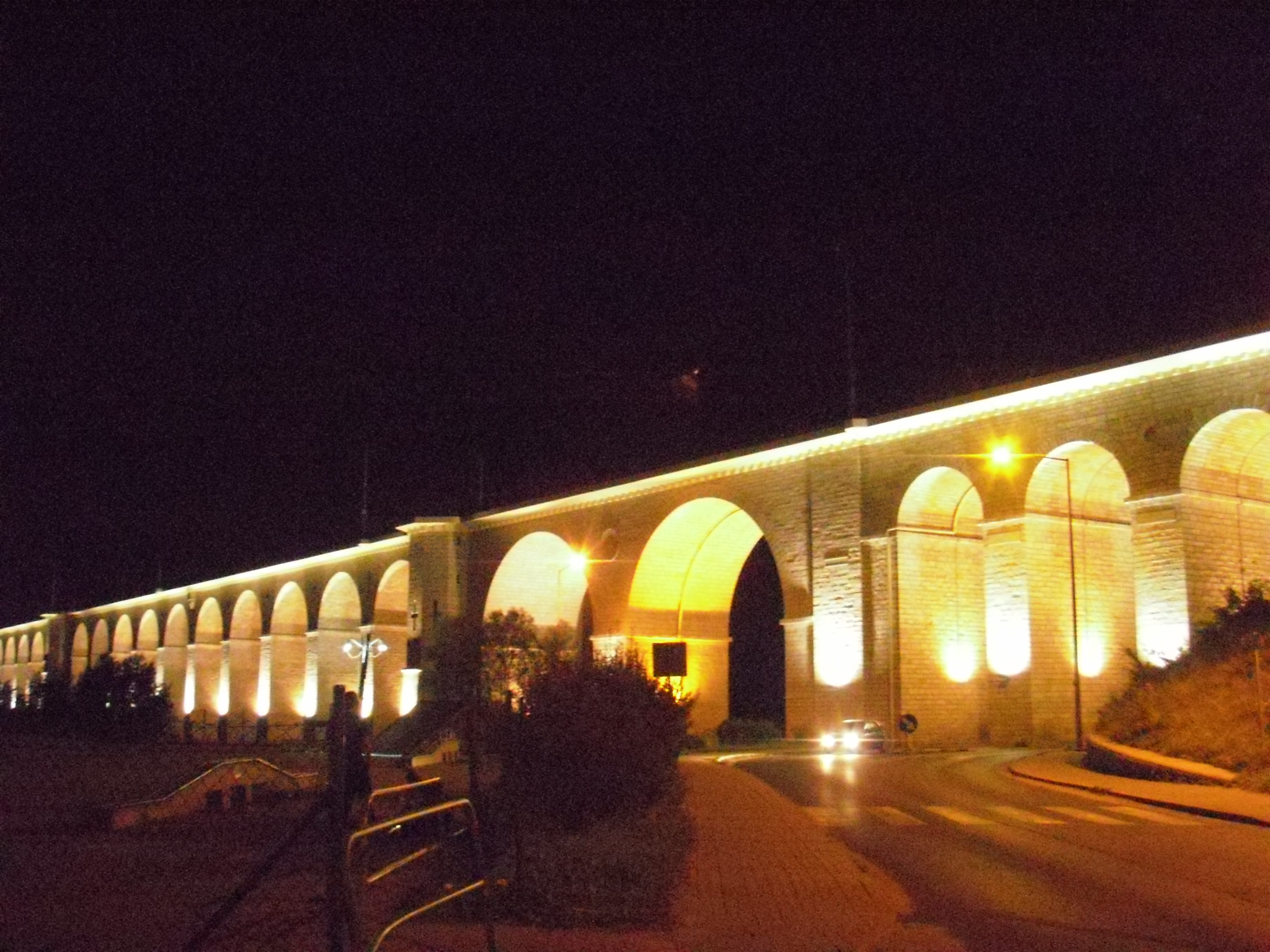 Bolesławiec, ośrodek historyczny miasta